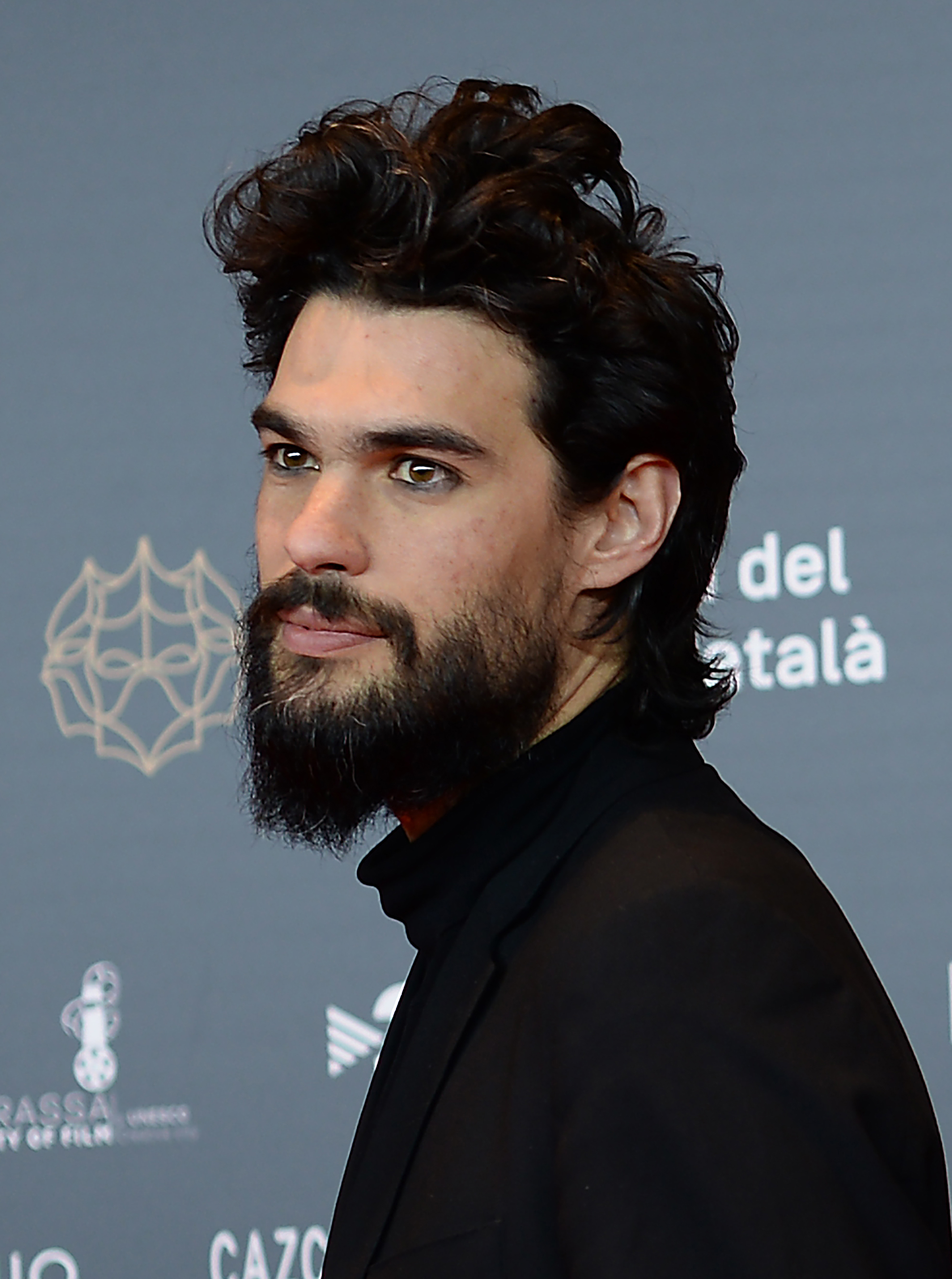 Óliver Laxe, director de cinema, XII Premis Gaudí (2020)